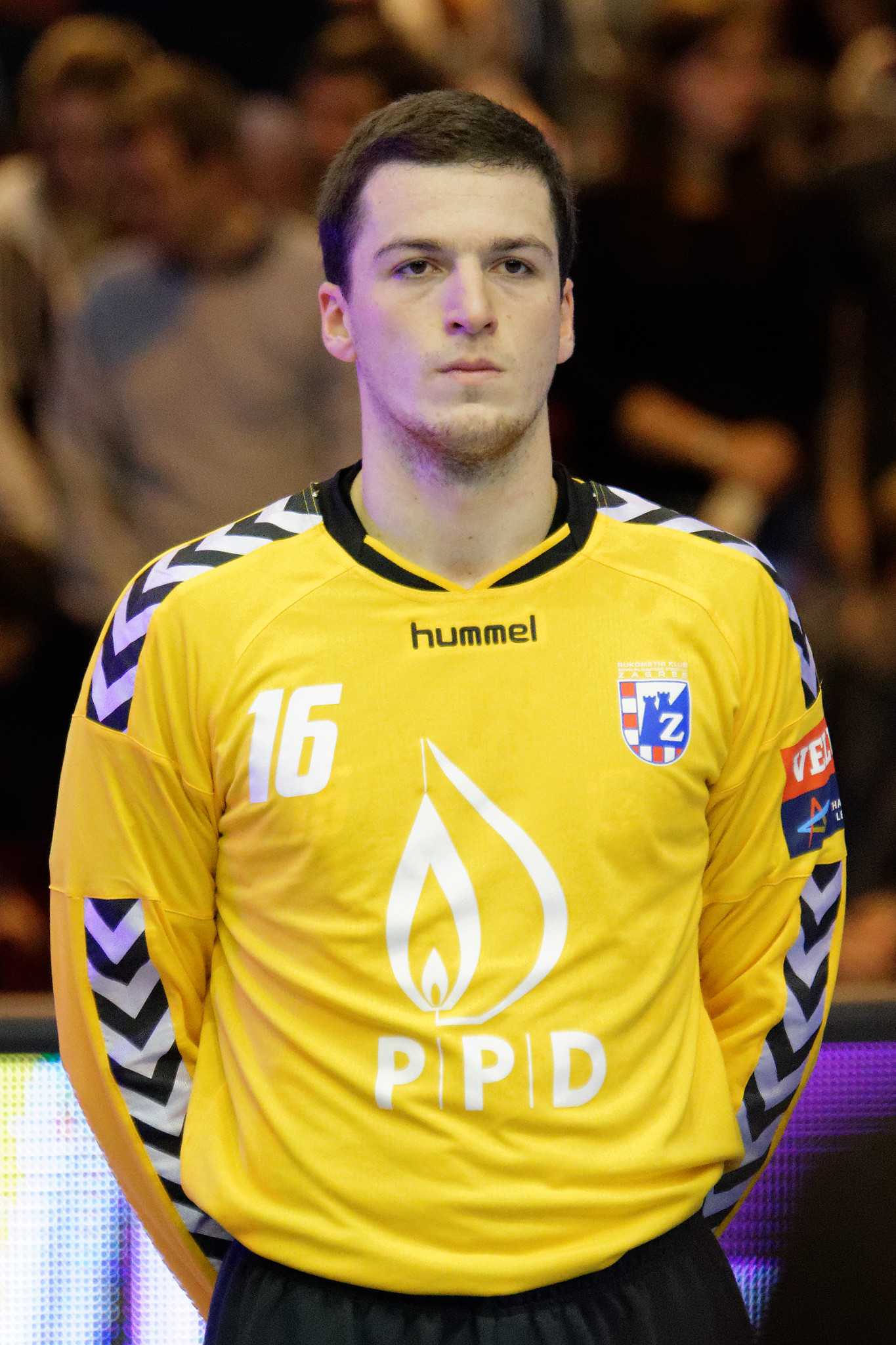 Rencontre de phase de groupe de la ligue des champions 2015-16 entre le PSG et le RK Zagreb. A la Halle Carpentier (Paris), le 11 ocotbre 2015.